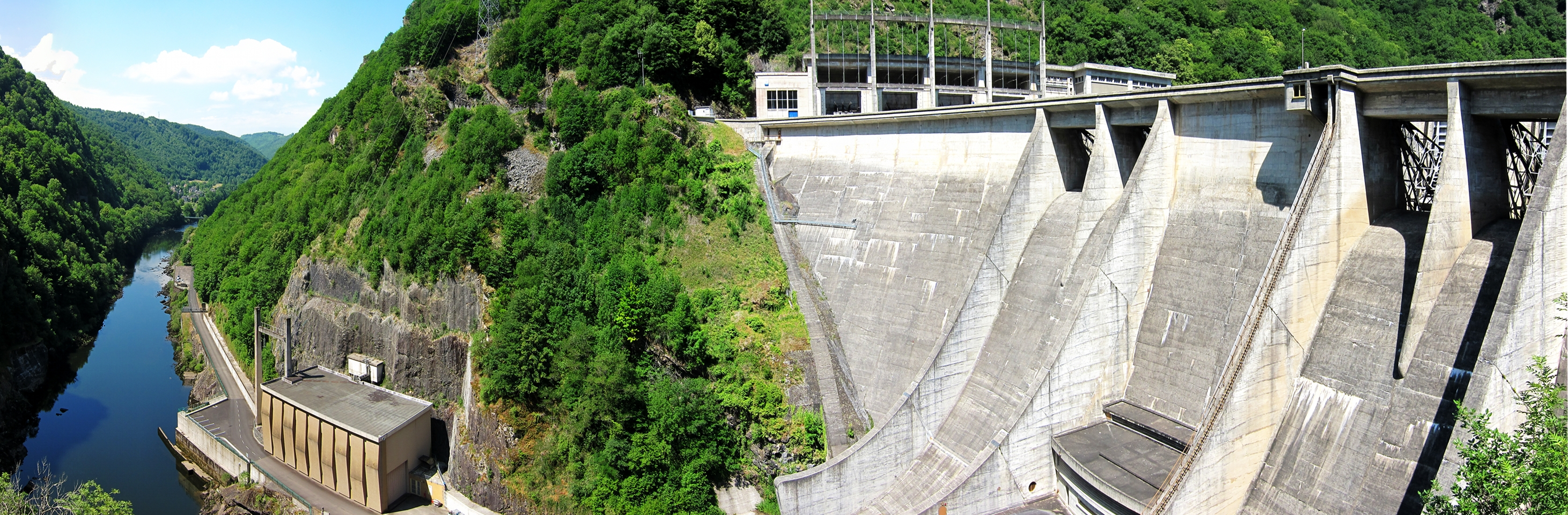 Le barrage de l'Aigle (Corrèze).